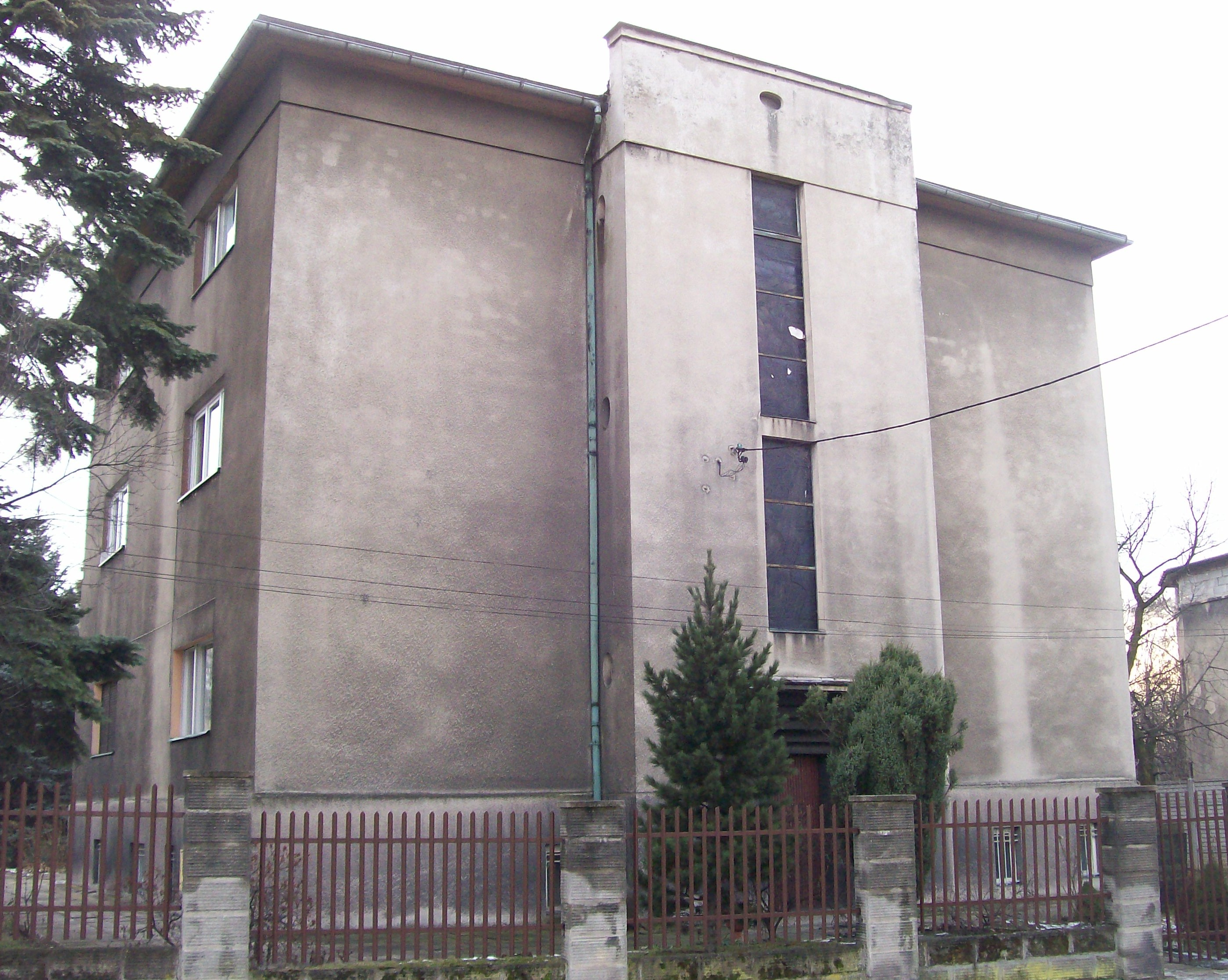 Kościół Adwentystów Dnia Siódmego - Katowice ul. Huberta 25.